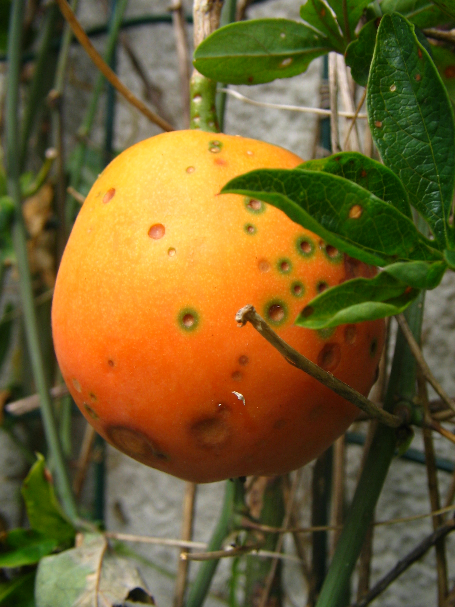 Passiflora aerulea fruit